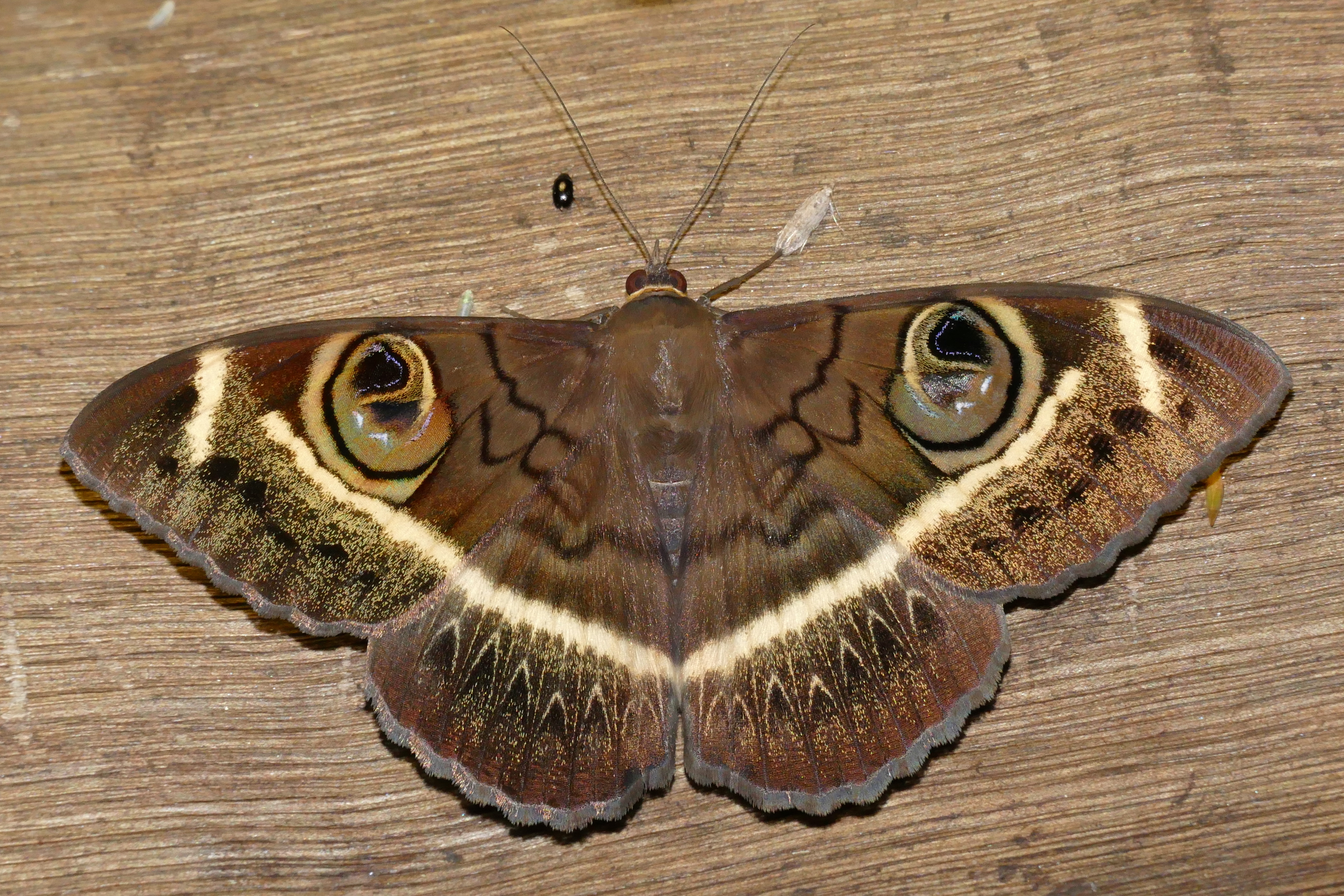 Letaba Camp, Kruger NP, SOUTH AFRICA